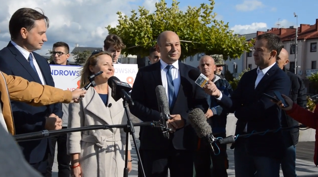 Marcin Witko - prezydent 60-tysięcznego Tomaszowa Mazowieckiego, w województwie łódzkim, PL, EU, CC0